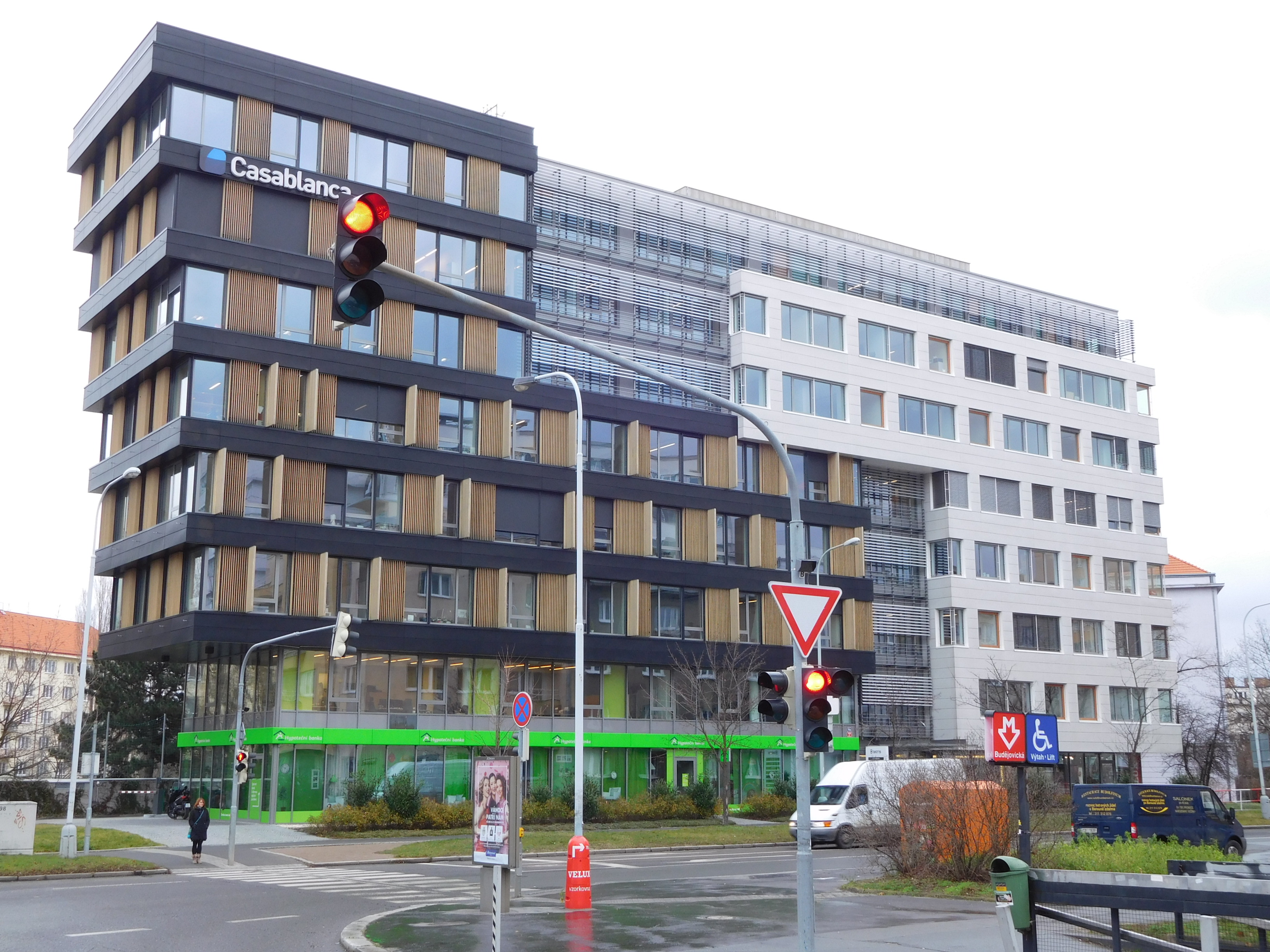 Praha - Michle, Budějovická 15a (Tetris office building)